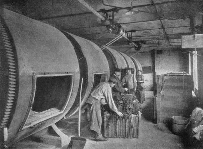 Fur cleaning machines - Pelz-Läuterungstrommeln von der Persianer-Zurichterei der Firma Thorer, Leipzig. Läutertrommeln zur Pelzreinigung. Vor 1906